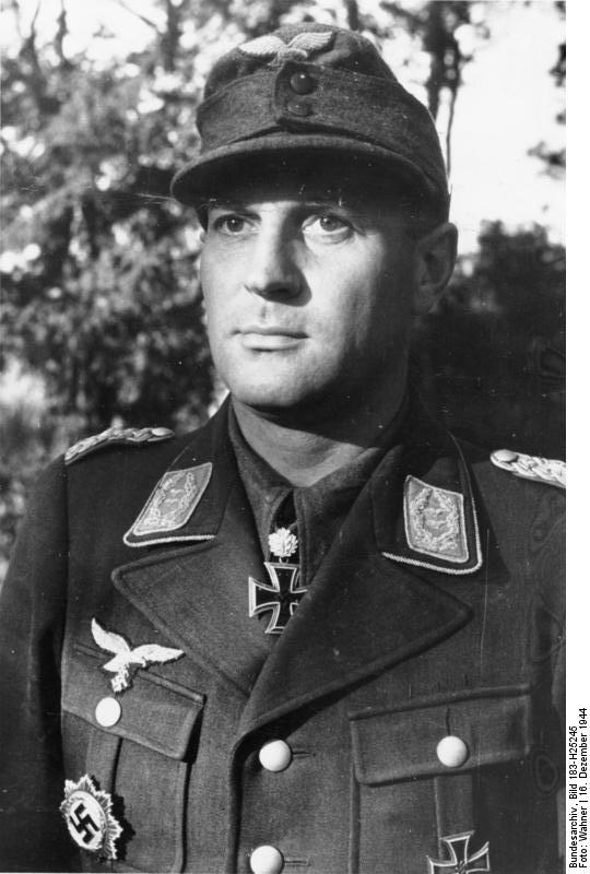 Bei Bologna, 16.12.1944 Eichenlaubträger Oberstleutnant Gericke. Regimentskommandeur eines Fallschirmjäger-Regiments. Prop.Kp. Wm.Kb.Abt. Luftwaffe Bildberichter Wahner, Scherl Bilderdienst